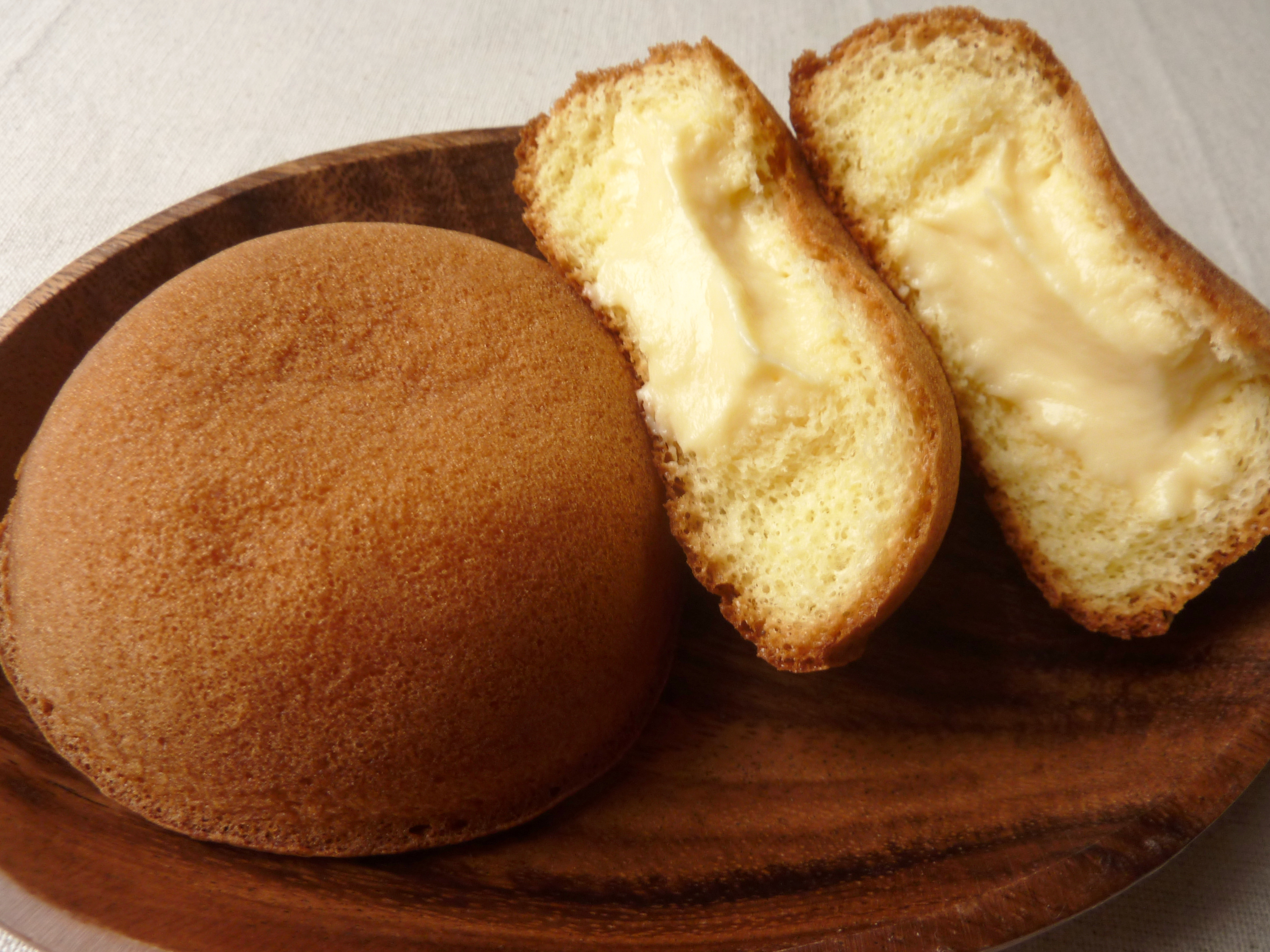 神奈川県鎌倉市の鎌倉ニュージャーマンが製造販売するかまくらカスター(鎌倉カスター)・カスタード味